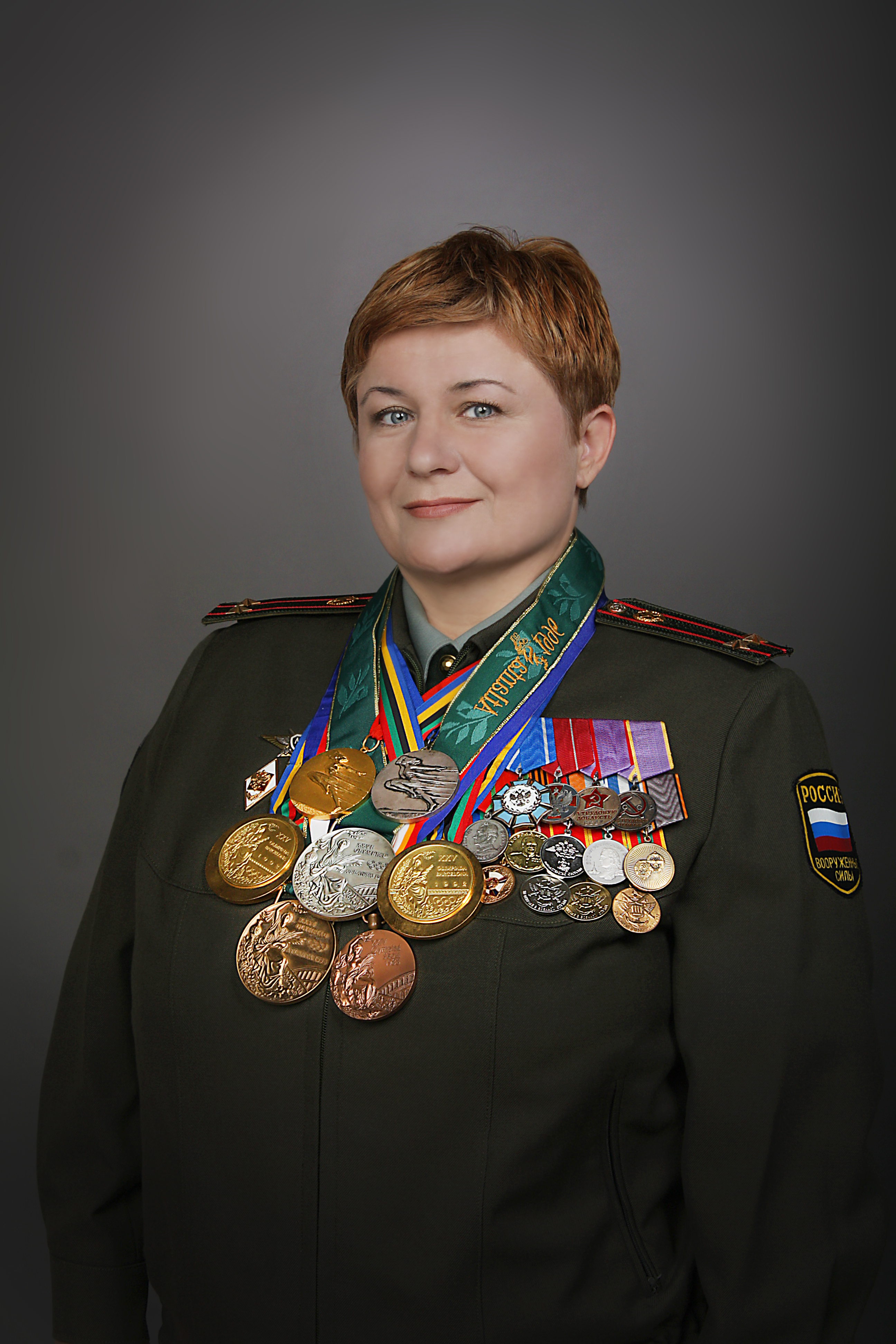 Мари́на Ви́кторовна (Добранчева) Логвине́нко. Знаменитая советская и Российская спортсменка, (пулевая стрельба). С 1981 по 2002 годы член сборных команд СССР, СНГ, РОССИИ. Двукратная Олимпийская чемпионка 1992 года, серебряный призёр Олимпийских игр 1996 года, бронзовый призёр Олимпийских игр 1988,1996 года. 15-ти кратная чемпионка, двукратный серебряный и двукратный бронзовый призёр чемпионатов мира. 14-ти кратная чемпионка, 15-ти кратный серебряный, троекратный бронзовый призёр чемпионатов Европы. Двукратный победитель Финала кубка мира 1991,1992, серебряный призёр 1988,1991,1993,1996, бронзовый призёр 1988,1990,1995,1996 годов. В период с 1986 по 2002 год; 13-ти кратный победитель, 8-ми кратный серебряный и 6-ти кратный бронзовый призёр Этапов кубка мира. 38-ми кратный победитель чемпионатов и первенств СССР, СНГ, РОССИИ. Чемпионка, двукратный серебряный и бронзовый призёр 8-ой и 9-ой спрартакиады народов СССР. 14-ти кратный победитель кубка СССР и РОССИИ.